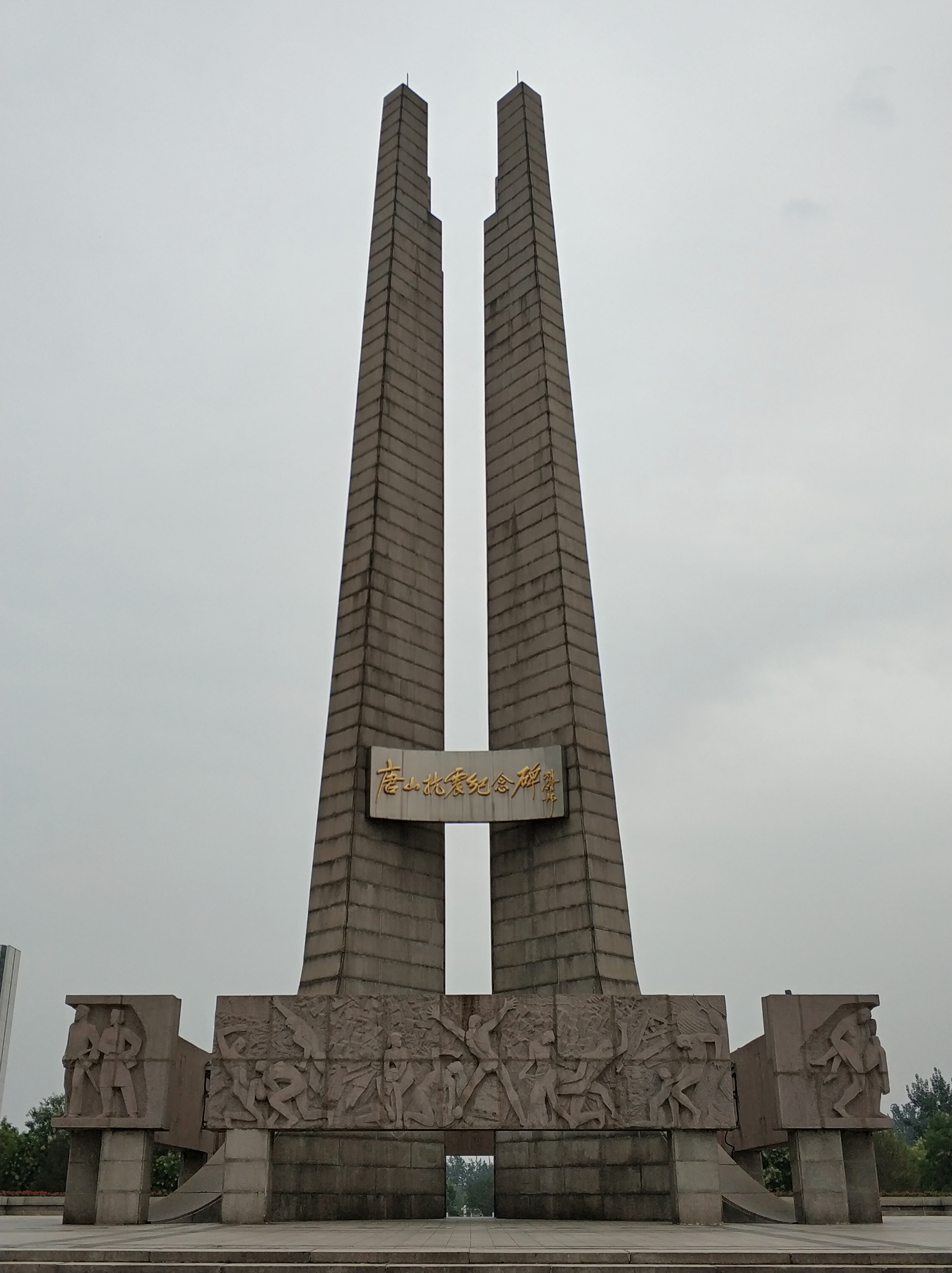 中文（中国大陆）: 位于唐山抗震纪念碑广场